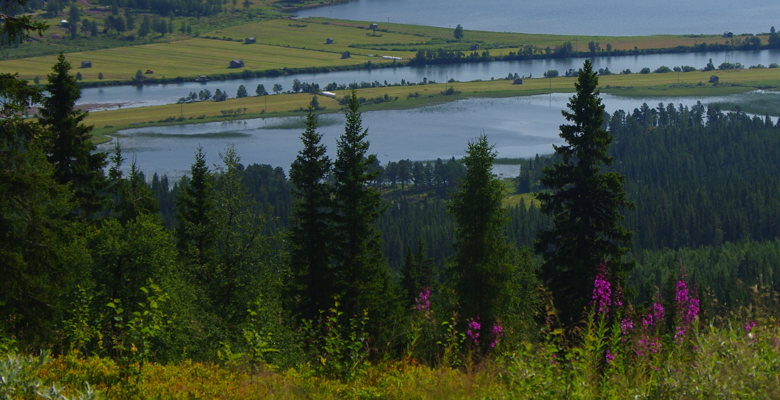 Noltjärn är en sjö i Sorsele kommun i Lappland. Sjön ligger i Natura 2000-området Ammarnäsdeltat.